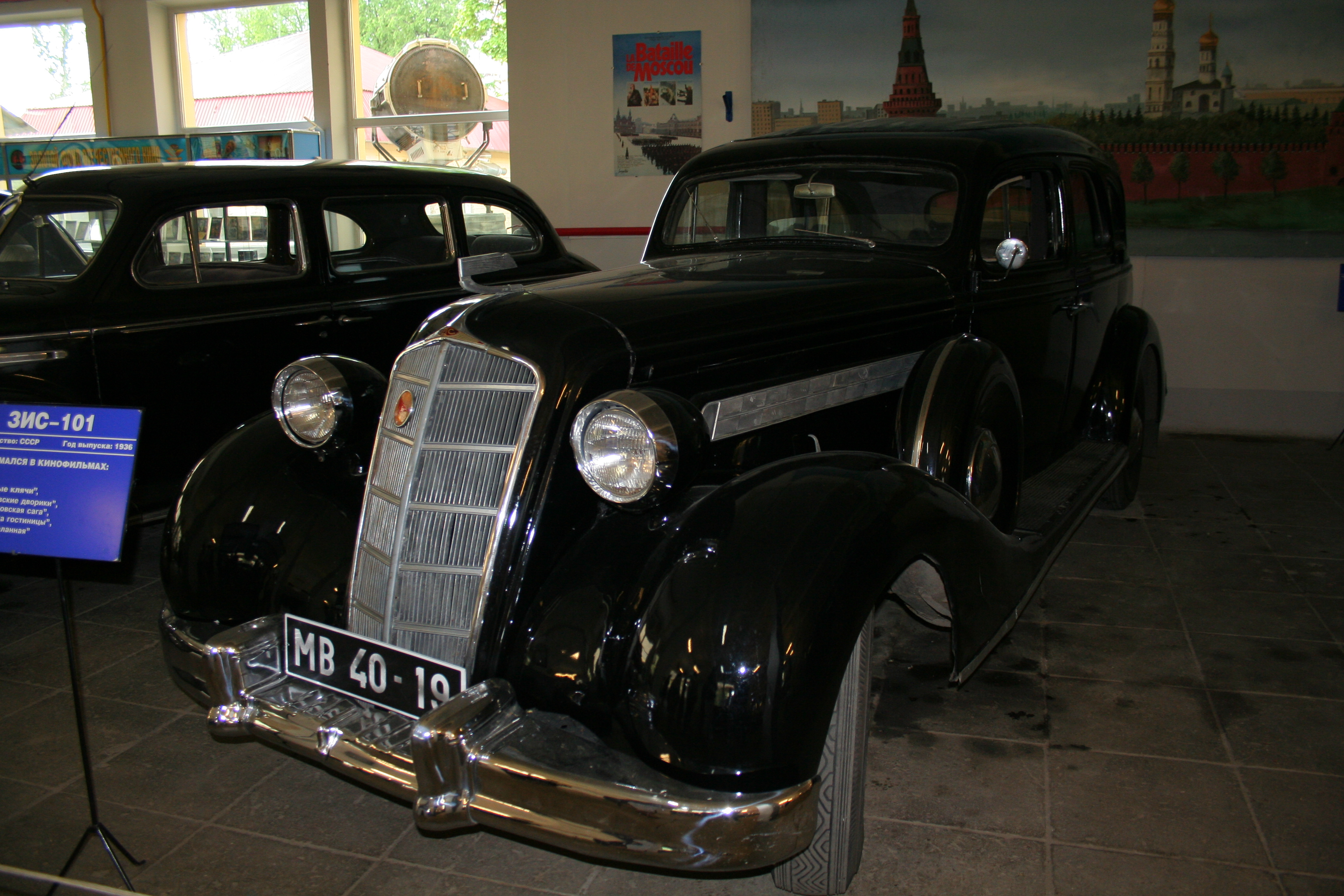 Museum auf dem Gelände des Filmstudios Mosfilm in Moskau. Die Exposition. ZIS-101, Baujahr 1936.